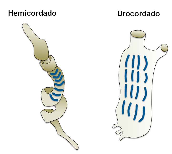 Filogenia ´posible de los faringoremas